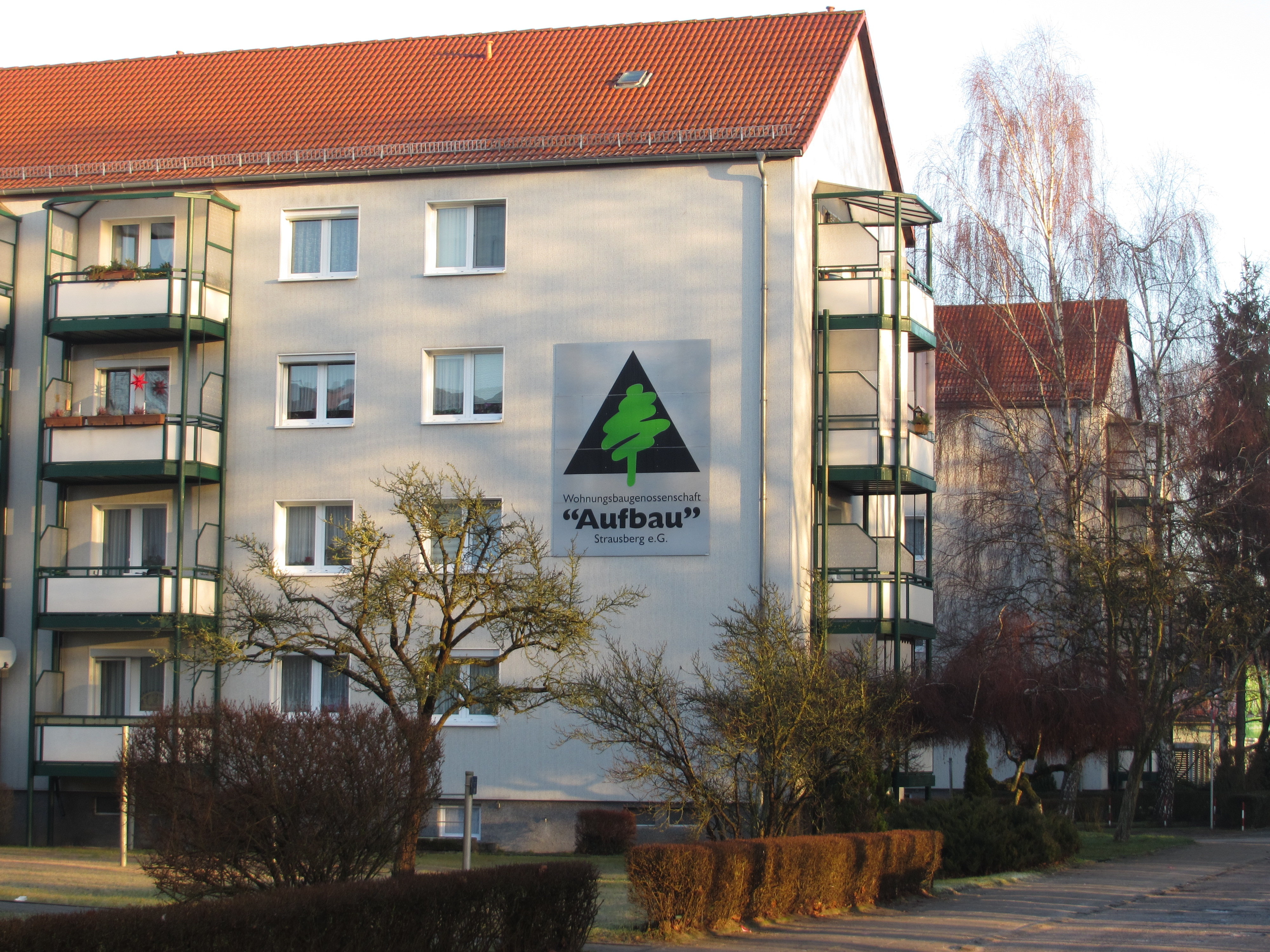 Gustav-Kurtze-Wohnpark Wohnungsbaugenossenschaft (WBG) Aufbau eG Strausberg - wärmegedämmtes Haus aus den 60er Jahren in Strausberg Vorstadt